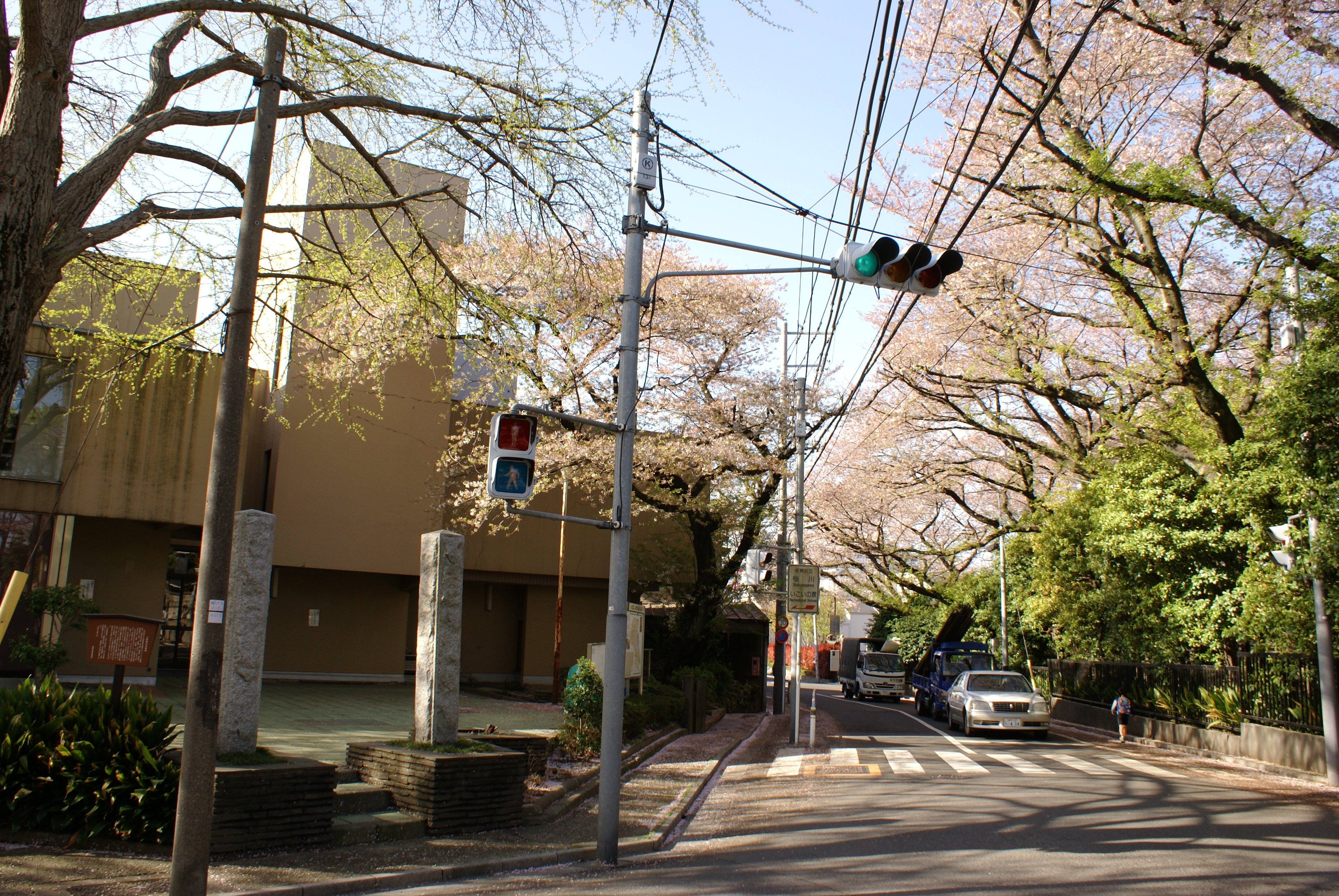 上板橋村役場跡（桜川いこいの家）